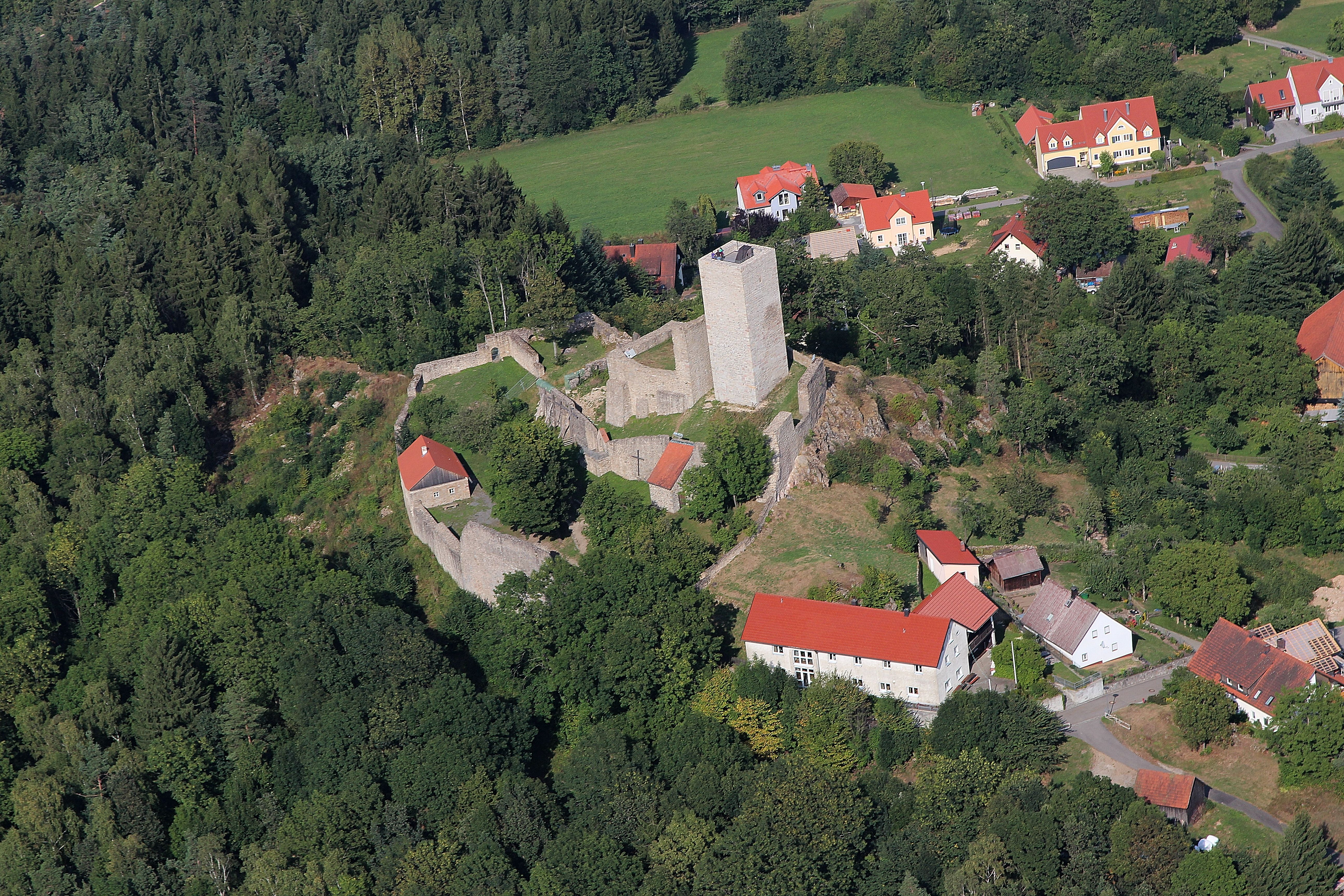 Burganlage Haus Murach, Stadt Oberviechtach, Landkreis Schwandorf, Oberpfalz, Bayern